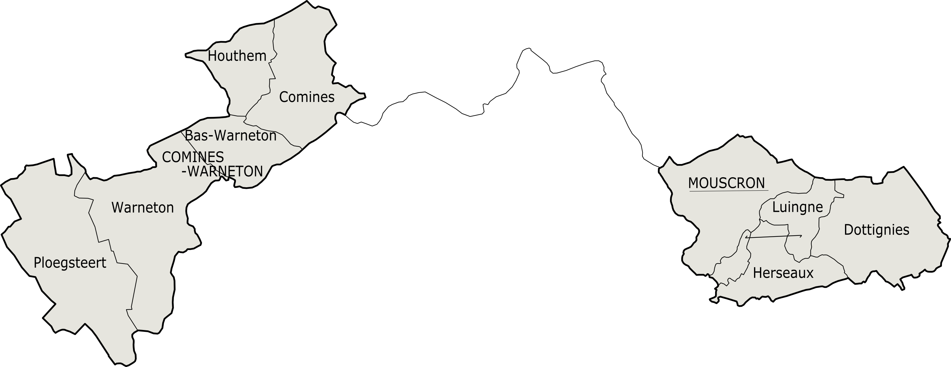 Mouscroni ringkonna vallad ja osavallad.